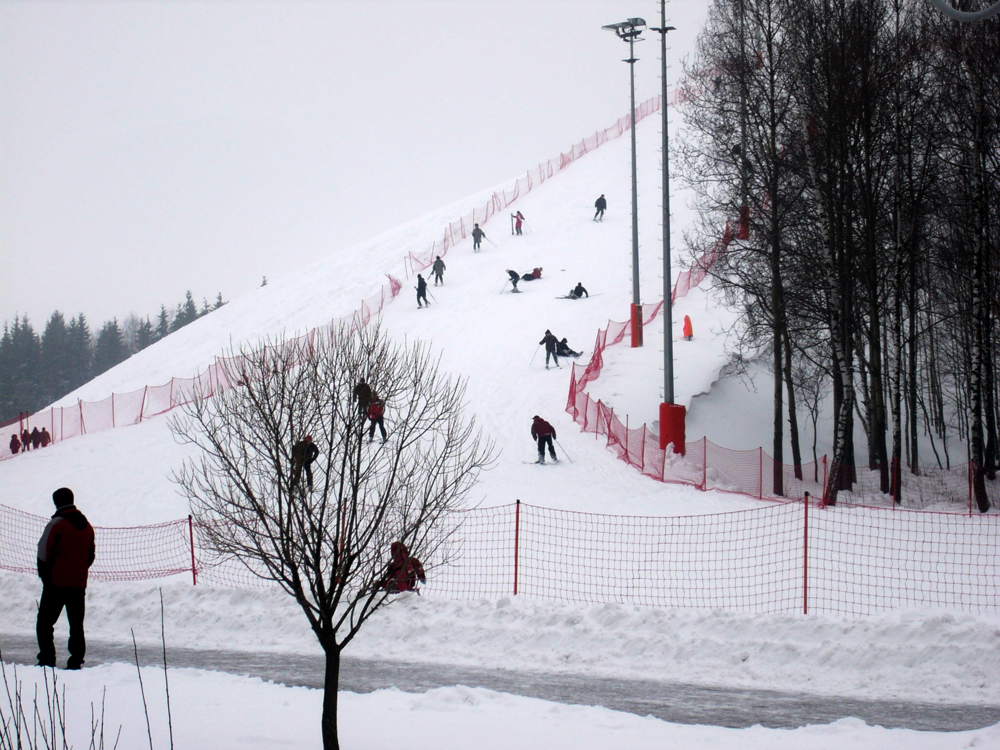 "Silichy" ski resirt in Belarus